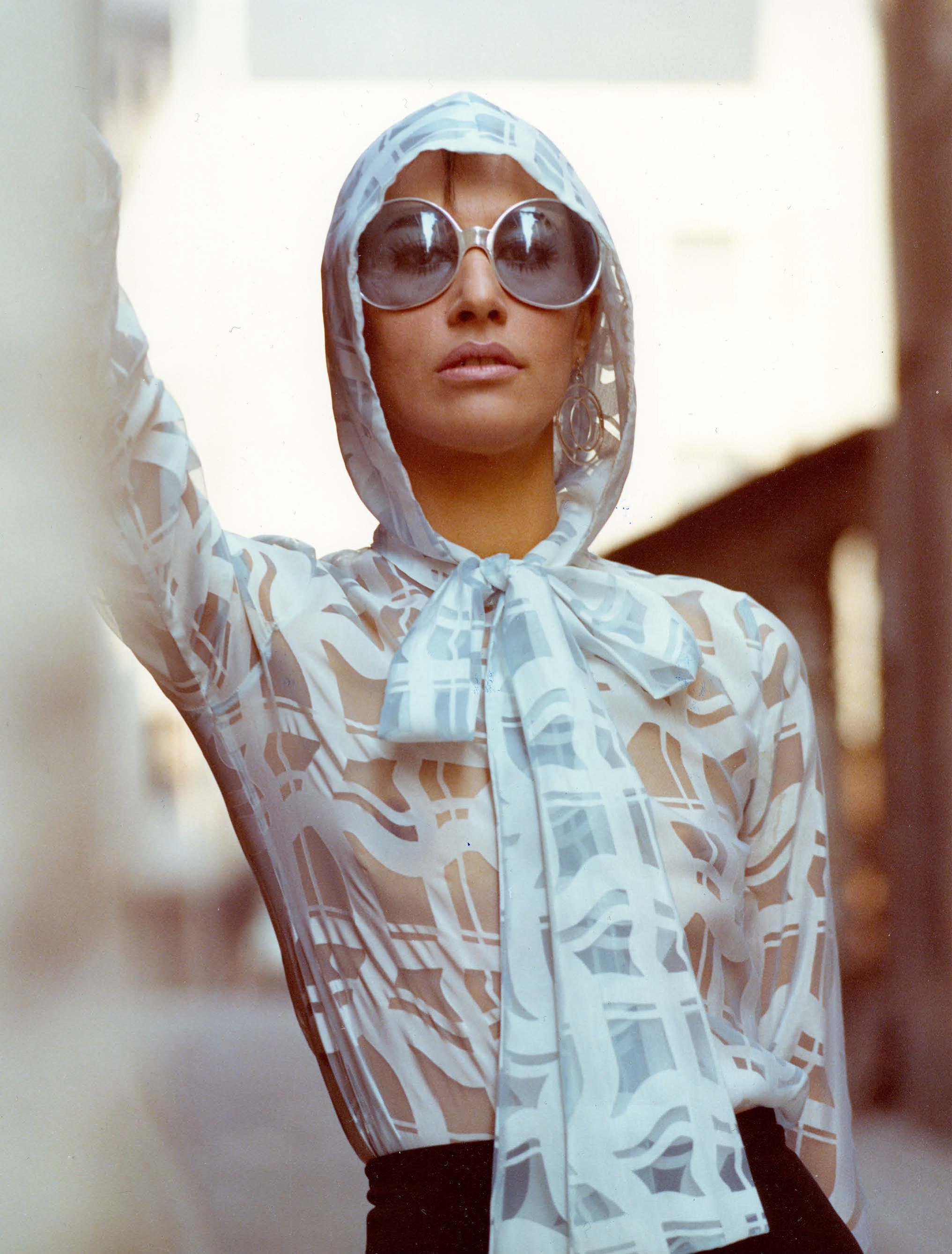 Das Jahr 1971 steht im Zeichen der Serie EIN FOTOGRAF, EIN MODELL, EIN JAHR